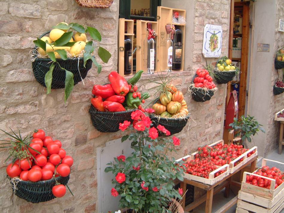 Casole d'Elsa en Toscane (Itali), produits régionaux